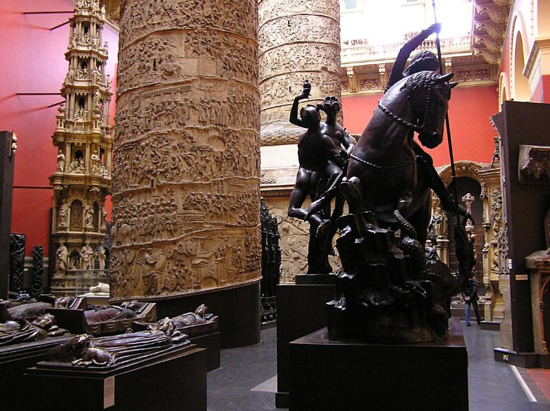 Room 46a